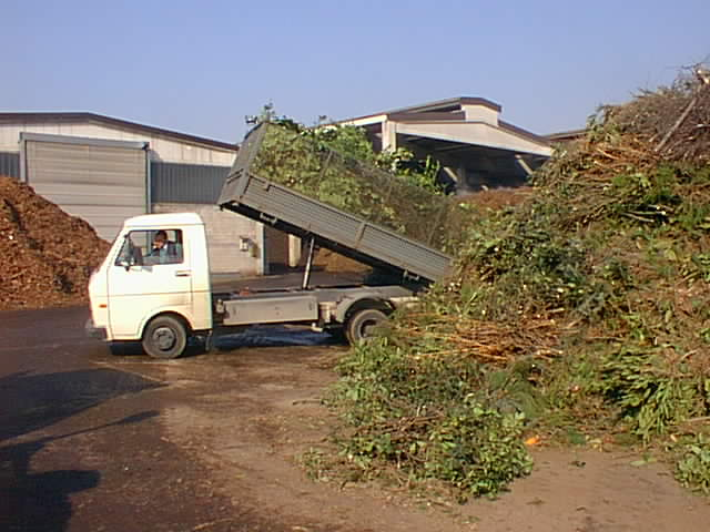 Vysypávání zahradního odpadu na kompostárně Berco u Milána; zdroj: Biom.cz, autor: Antonín Slejška